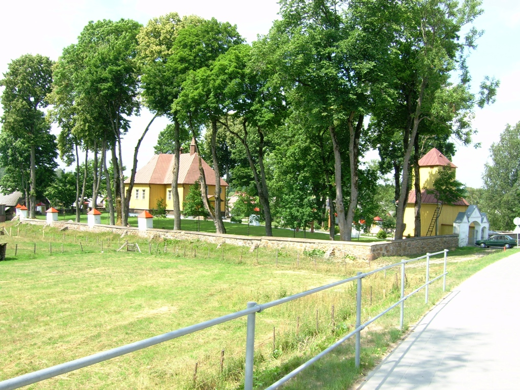 Pagramančio bažnyčia